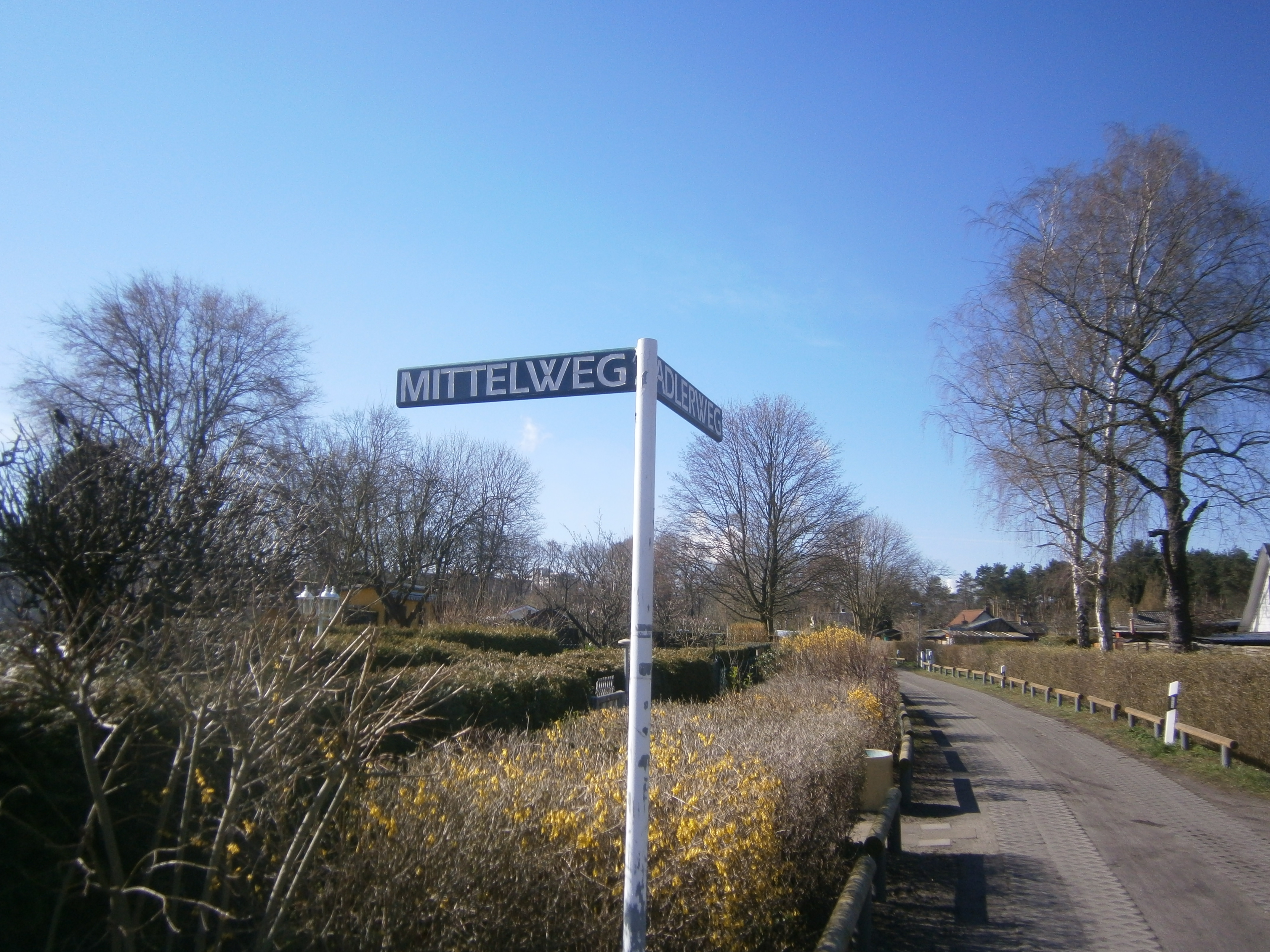 Die KGA Vor den Toren VI ist eine Garten- und Siedlerkolonie in Berlin-Tegel, Bezirk Reinickendorf, auf den Mäckeritzwiesen. Hier der Mittelweg in der Kolonie.